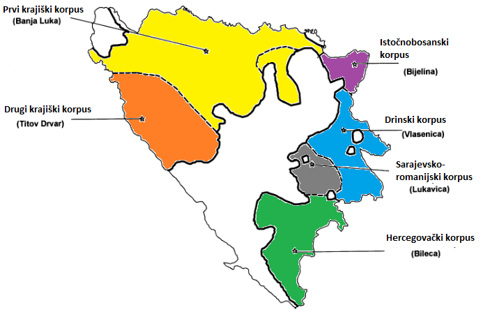 Зоне одговорности корпуса Војске Републике Српске